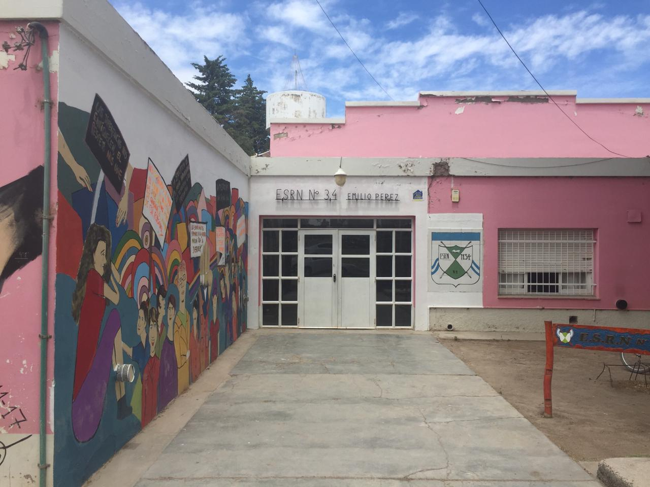 Fachada de la Escuela Secundaria Rio Negro N° 34, anteriormente era Centro de Educación Media N° 34. Esta ubicada en la localidad de Ingeniero Huergo - Provincia de Rio Negro.